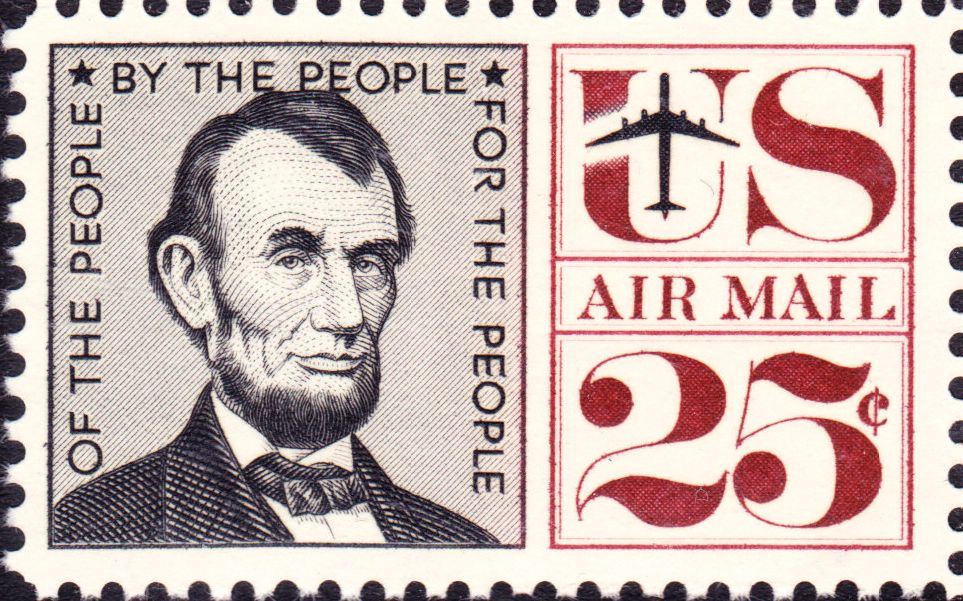 U.S. Postage Issue: Abraham_Lincoln_Airmail_1960_Issue-25c.jpg